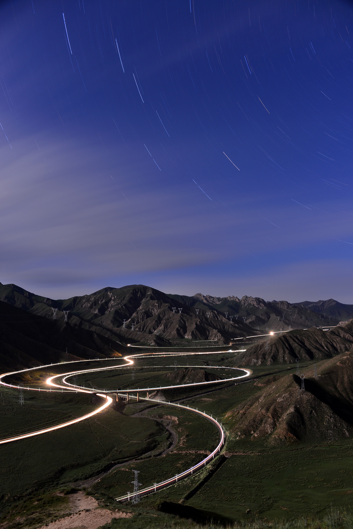 巡道工出品 photo by Xundaogong——关角B门